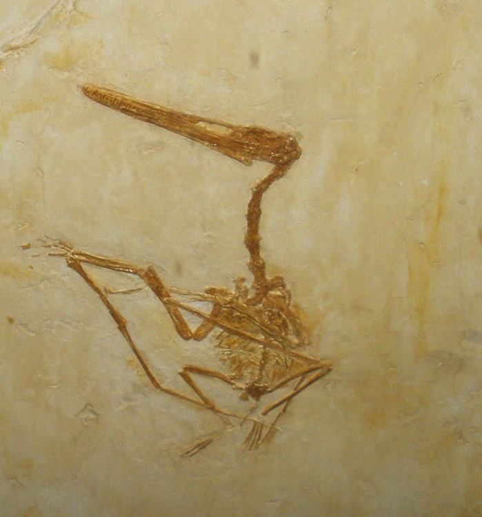 Fossil of Aerodactylus scolopaciceps (formerly Pterodactylus), an extinct pterosaur- Took the photo at Senckenberg of Frankfurt